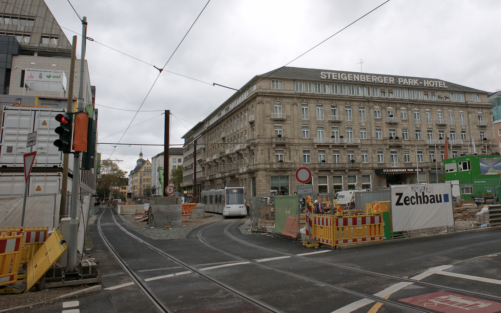 Düsseldorf, Steinberger Park-Hotel (Baustelle 2012)